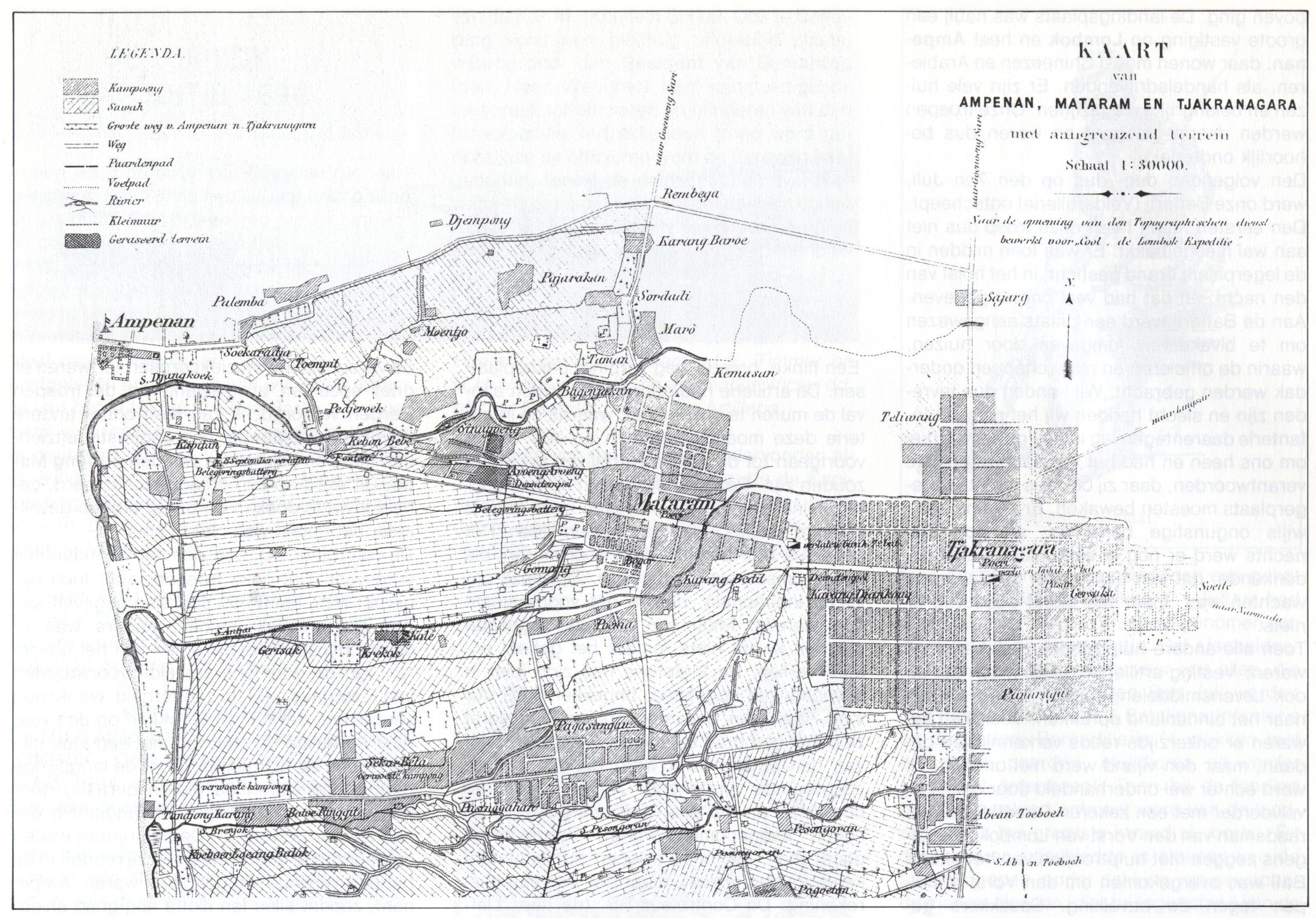 Kaart van de Lombok Expeditie te 1894 met de plaatsen Ampenan Mataram en Tjakra Negara.